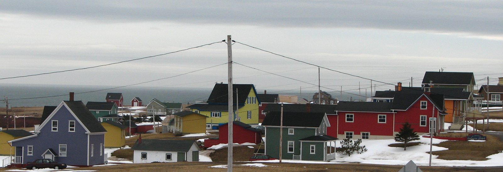 Maisons du village de Bassin, aux Îles-de-la-Madeleine. / Houses in the town of Bassin